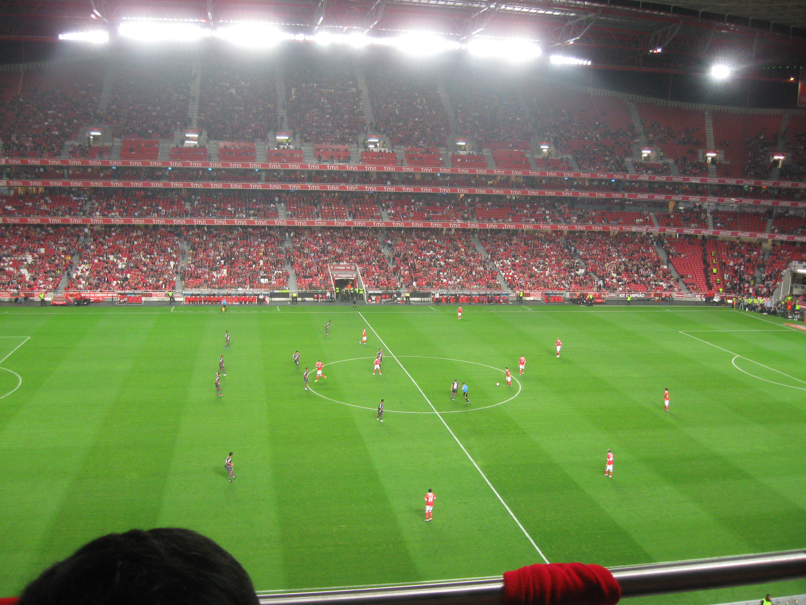 Benfica-Braga 2010/2011